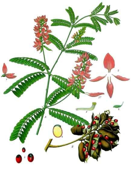 Paternostererbse. A blühender Zweig, natürl. Grösse; B Fruchttraube, desgl.; 1 Blüthe, wenig vergrössert; 2 u. 2a Kronenblätter, vergrössert; 3 Staubgefässe, desgl.; 4 Stempel, desgl.; 5 Samen, natürl. Grösse und vergrössert.